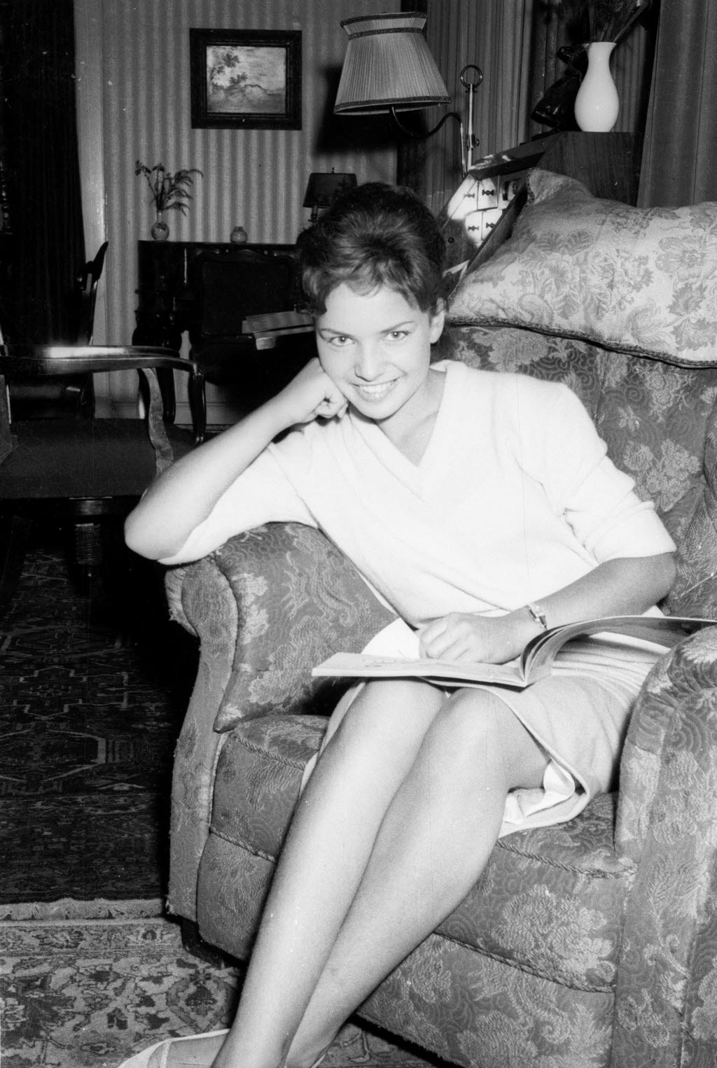 Schauspielerin Barbara Frey im Hotel Conti-Hansa am Schlossgarten 7.